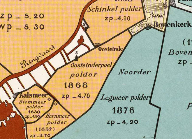 Oosteinderpoelpolder